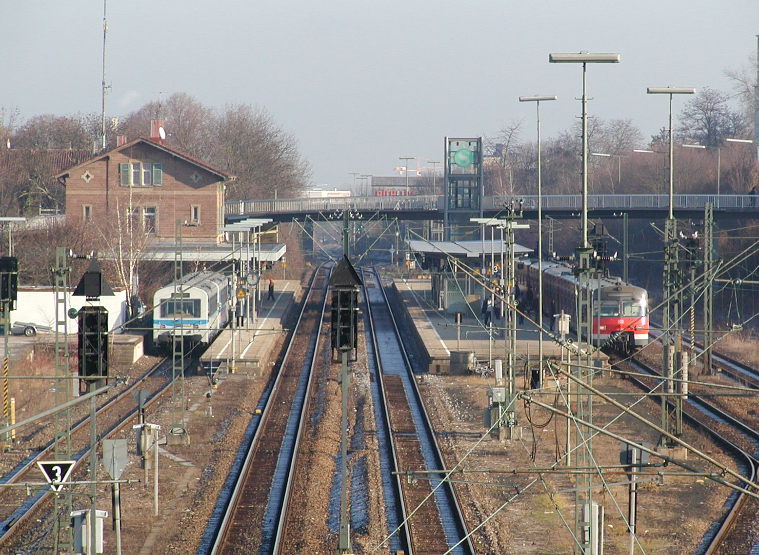 Korntal, der Bahnhof von der Brücke aus gesehen, Mit zwei NE-81-Garnituren von 1993.